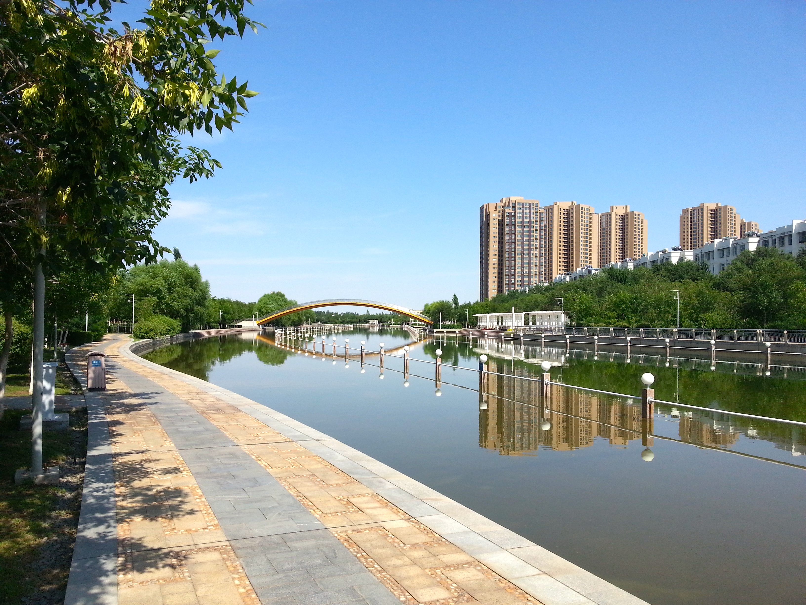 Karamay-elven som går gjennom byen Karamay i Xinjiang